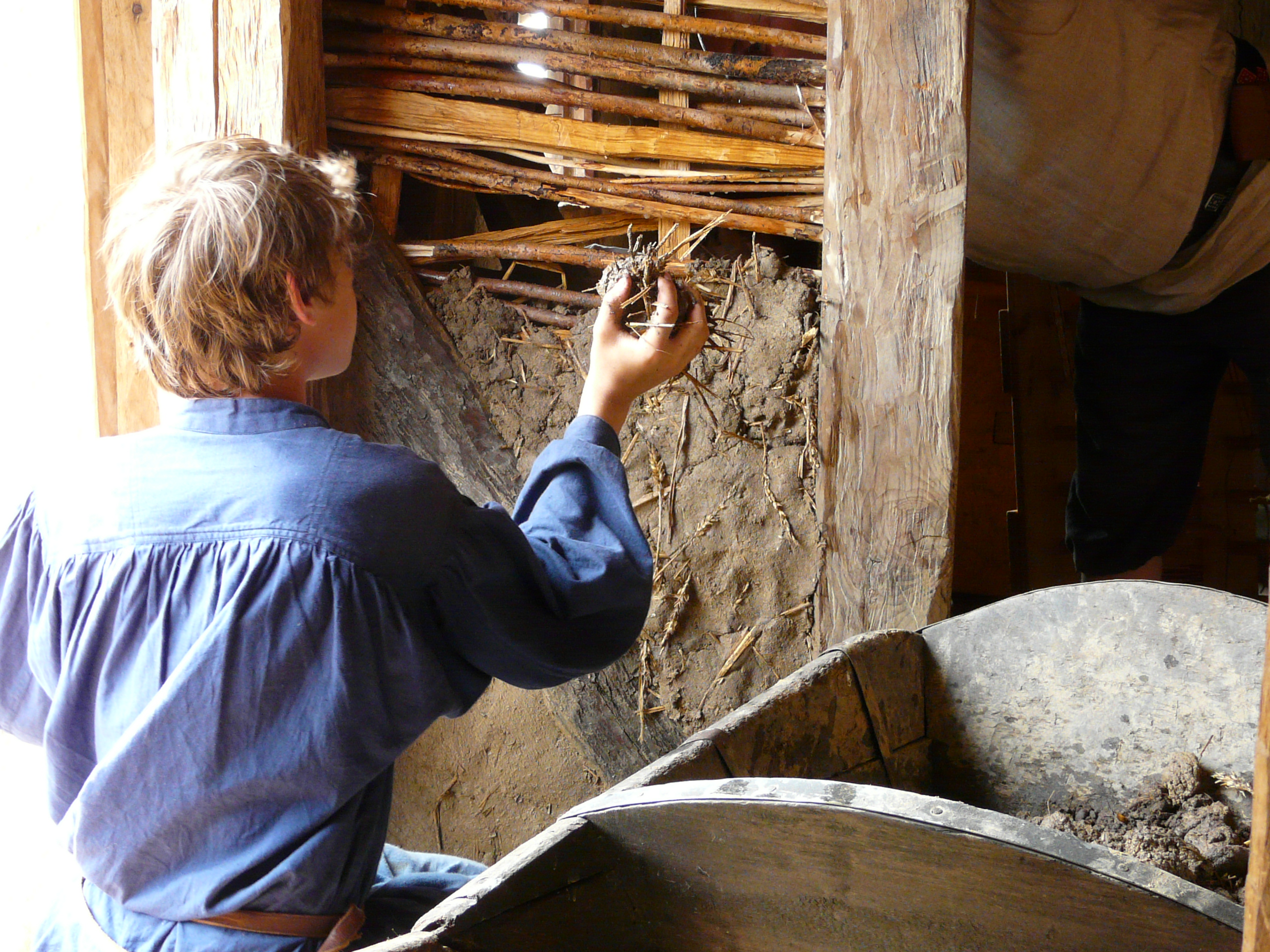 Aufbau einer Lehmflechtwand in einem der Wikingerhäuser des Wikingermuseums Foteviken